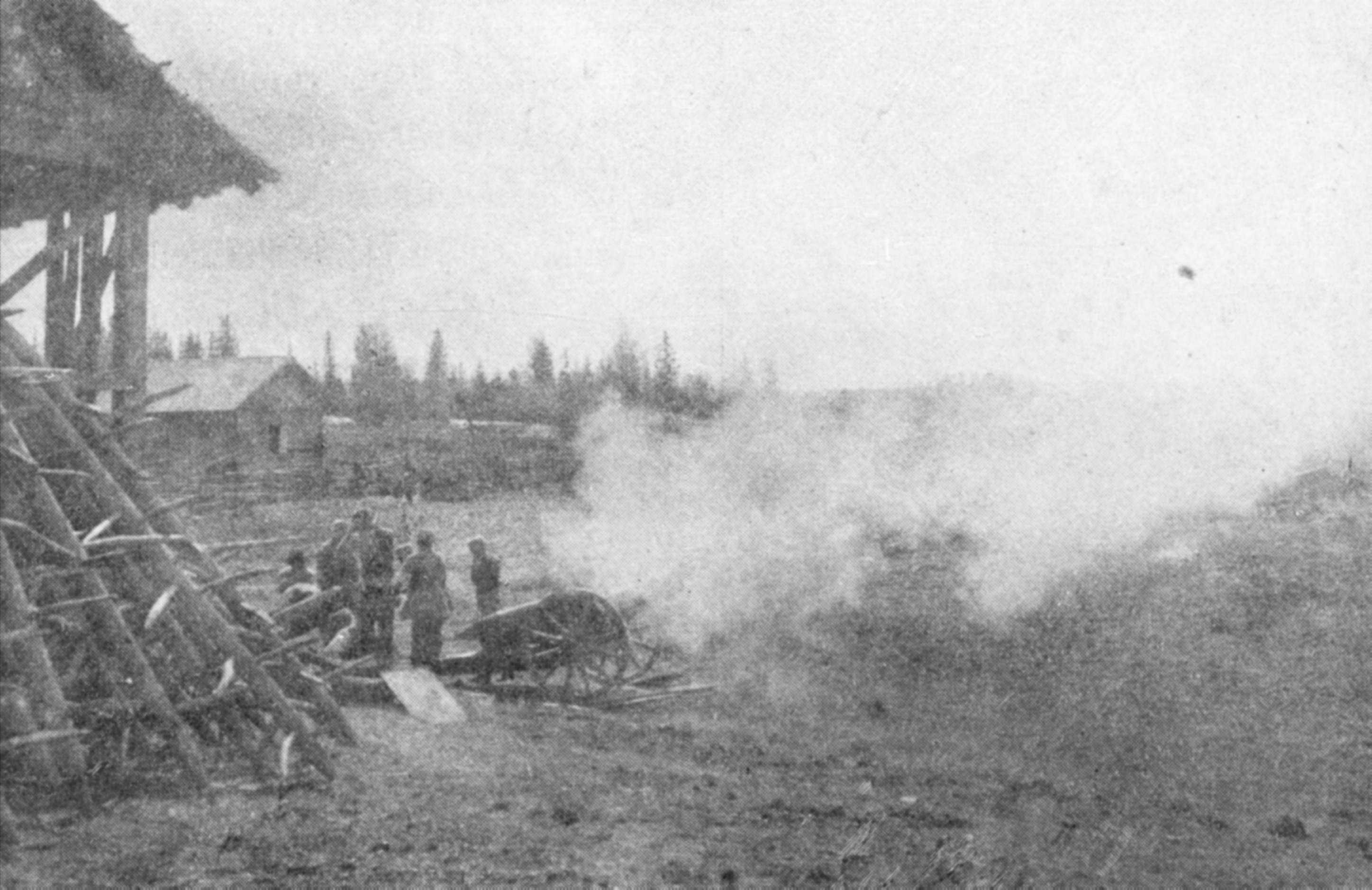 Description